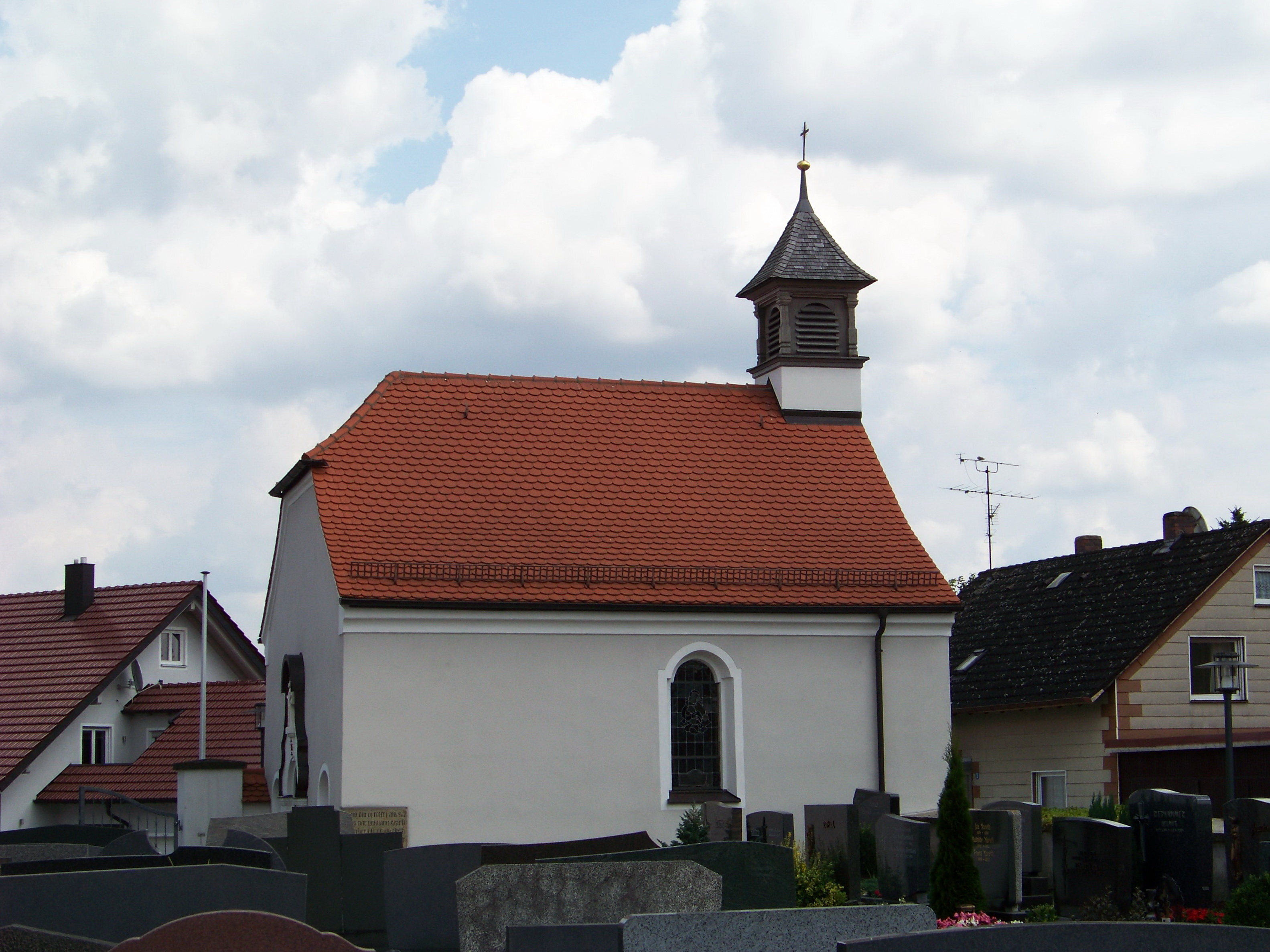 Mintraching, Moosham. Ehem. Friedhofs-, jetzt Kriegergedächtniskapelle, Saalbau mit Halbwalm und Dachreiter, Portal mit Schweifrahmen, 17./18. Jahrhundert.